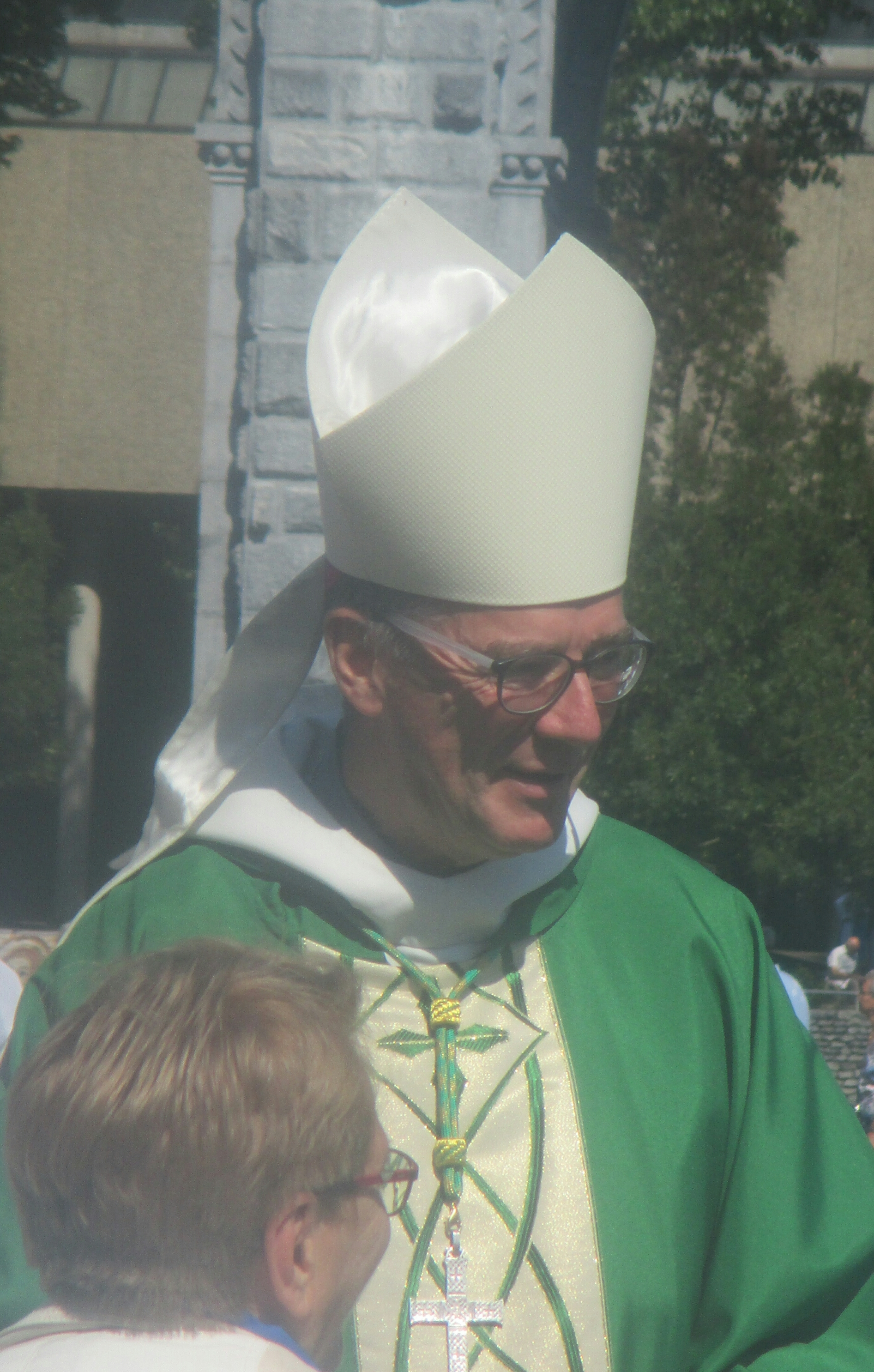 Mgr Christory, évêque de Chartres, à Lourdes en août 2019.